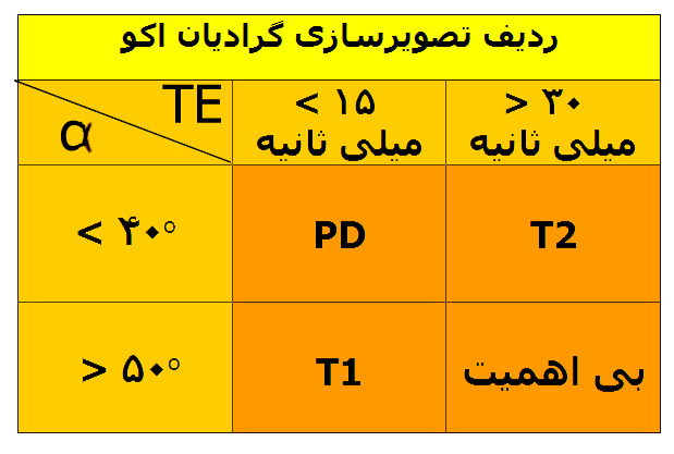 خودم جدول و شکل را ساختم. اما اعداد بر طبق اعداد ذکر شده در کتاب MRI: from Picture to Proton نوشته McRobbie است.